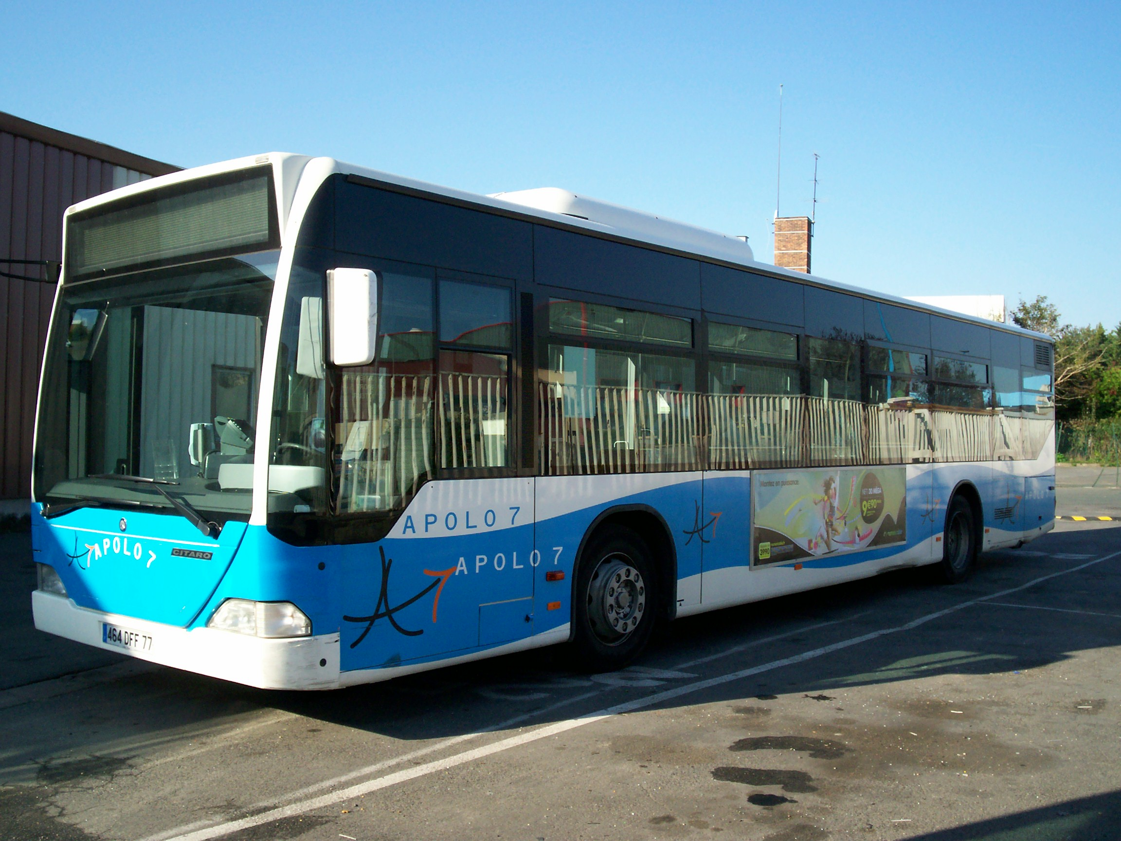 Citaro au dépot de la Trentaine